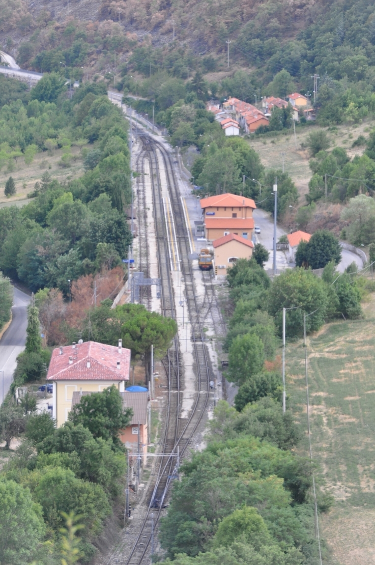 Vista panoramica della stazione ferroviaria di Cocullo